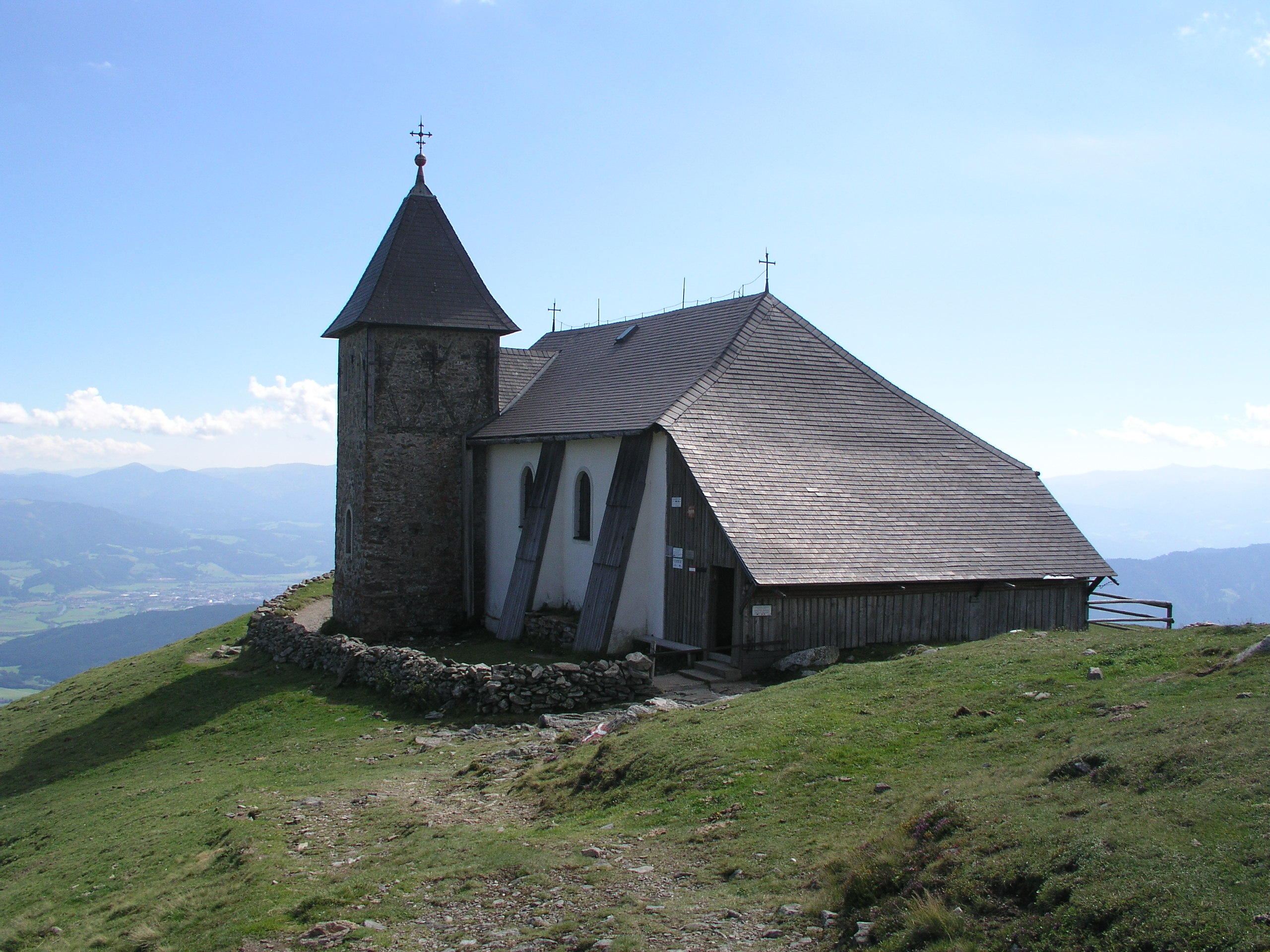 Wallfahrtskirche Maria Schnee Hochalm 2004; eigene Aufnahme des Autors